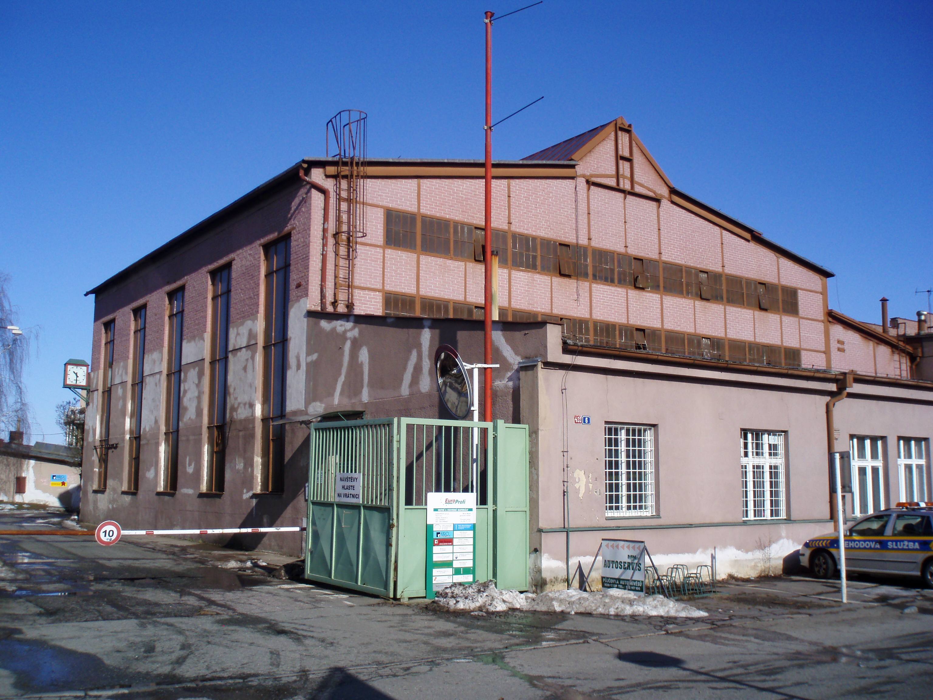 Bývalá Ippenova mostárna v Hradci Králové